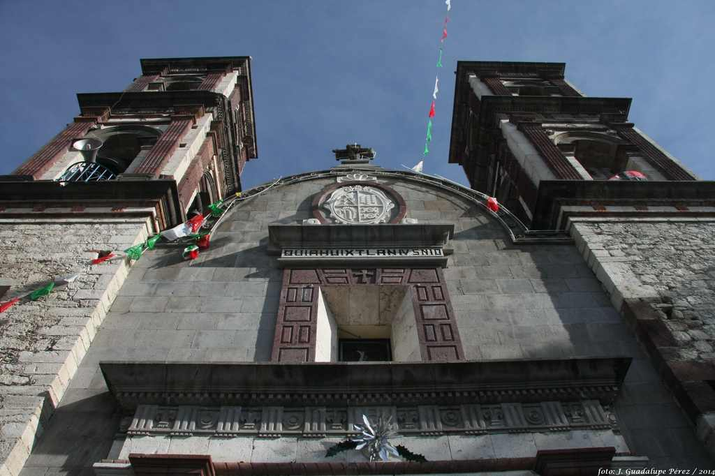 Totolac, Tlaxcala Foto: J. Guadalupe Pérez /2014